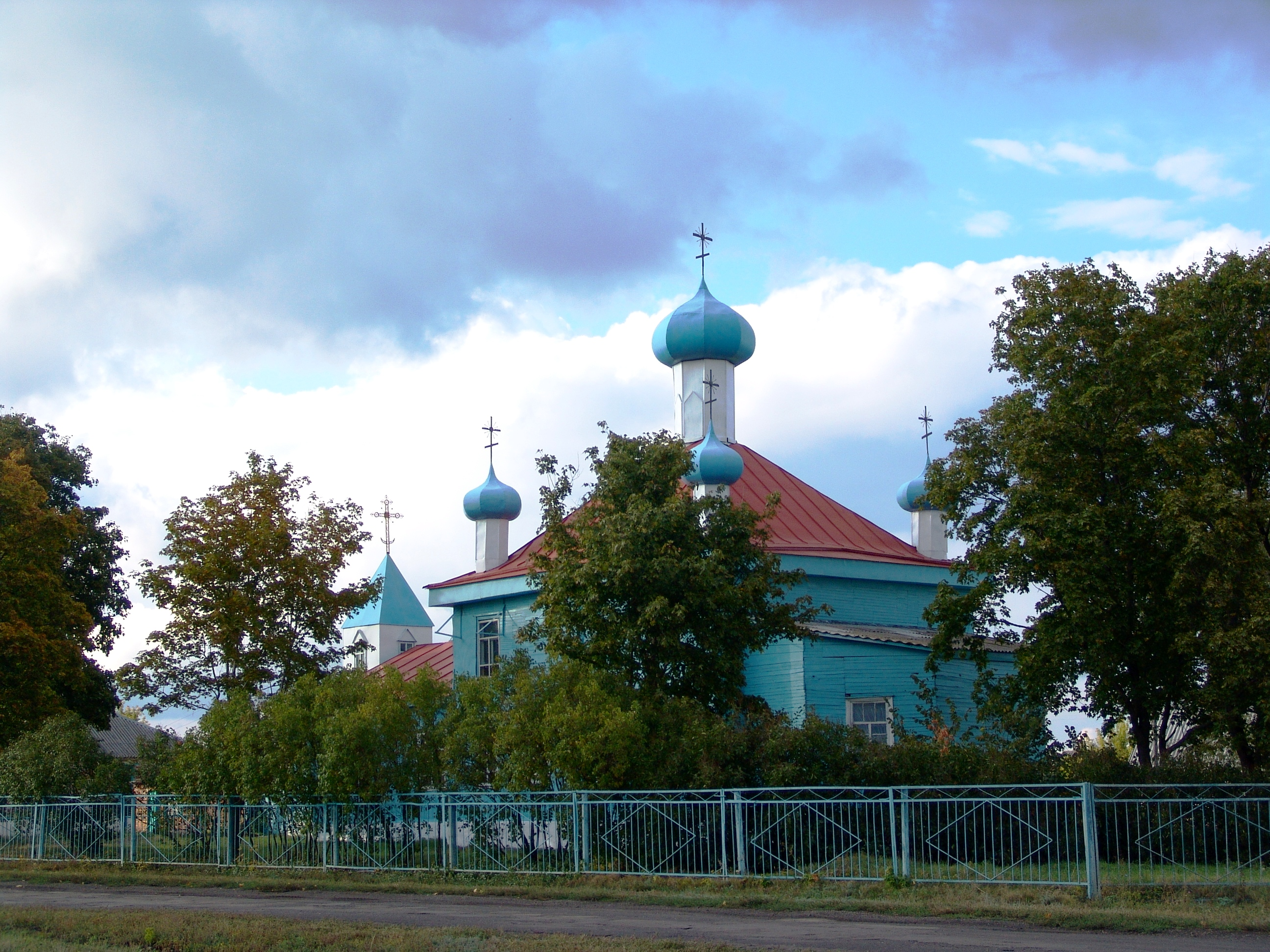 Церковь в селе Ивановка Жердевского района Тамбовской области